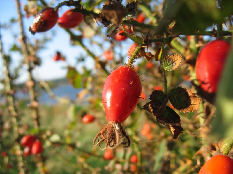 frutto (cinorrodo) di Rosa rubiginosa